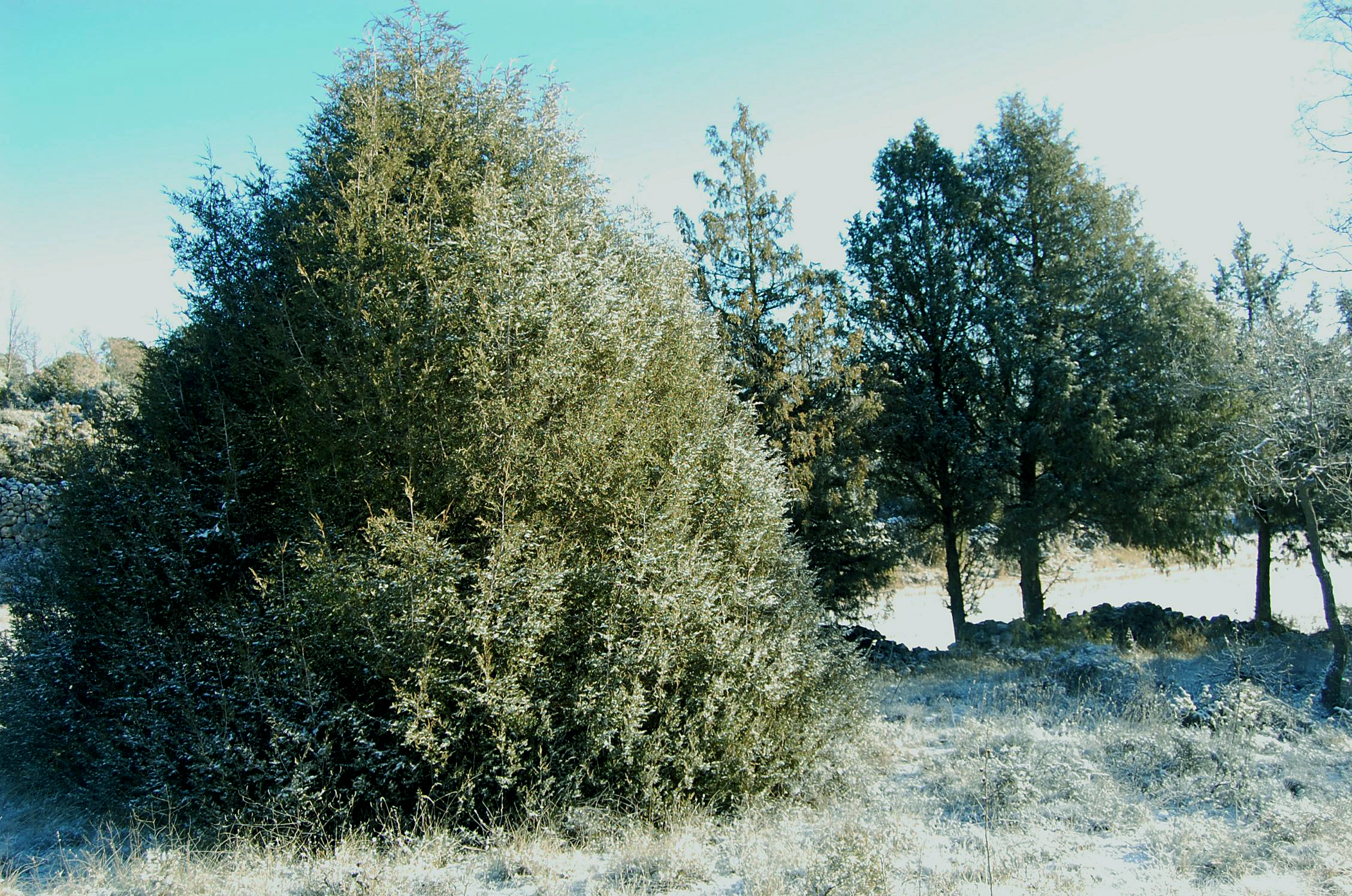 Vista de Sabinares en Torrecuadrada de los Valles